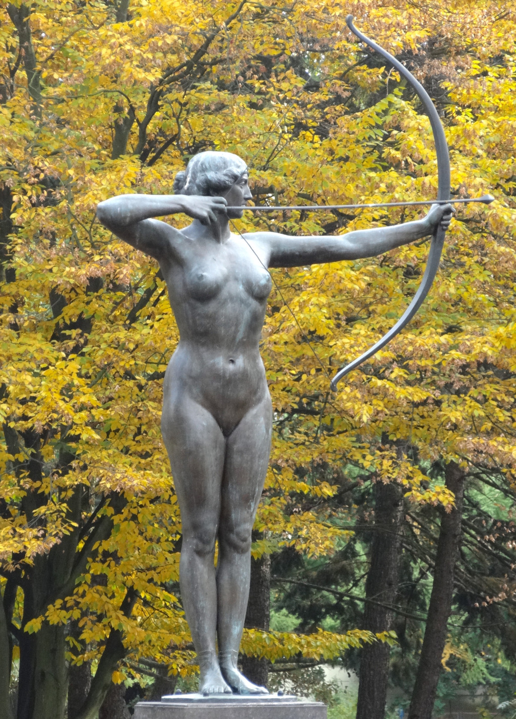 Rzeźba Łuczniczki autorstwa prof. Ferdinanda Lepcke odsłonięta w 1910 r. w Bydgoszczy